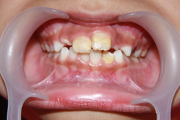 Características de delimitación de la lesion de hipomineralización.